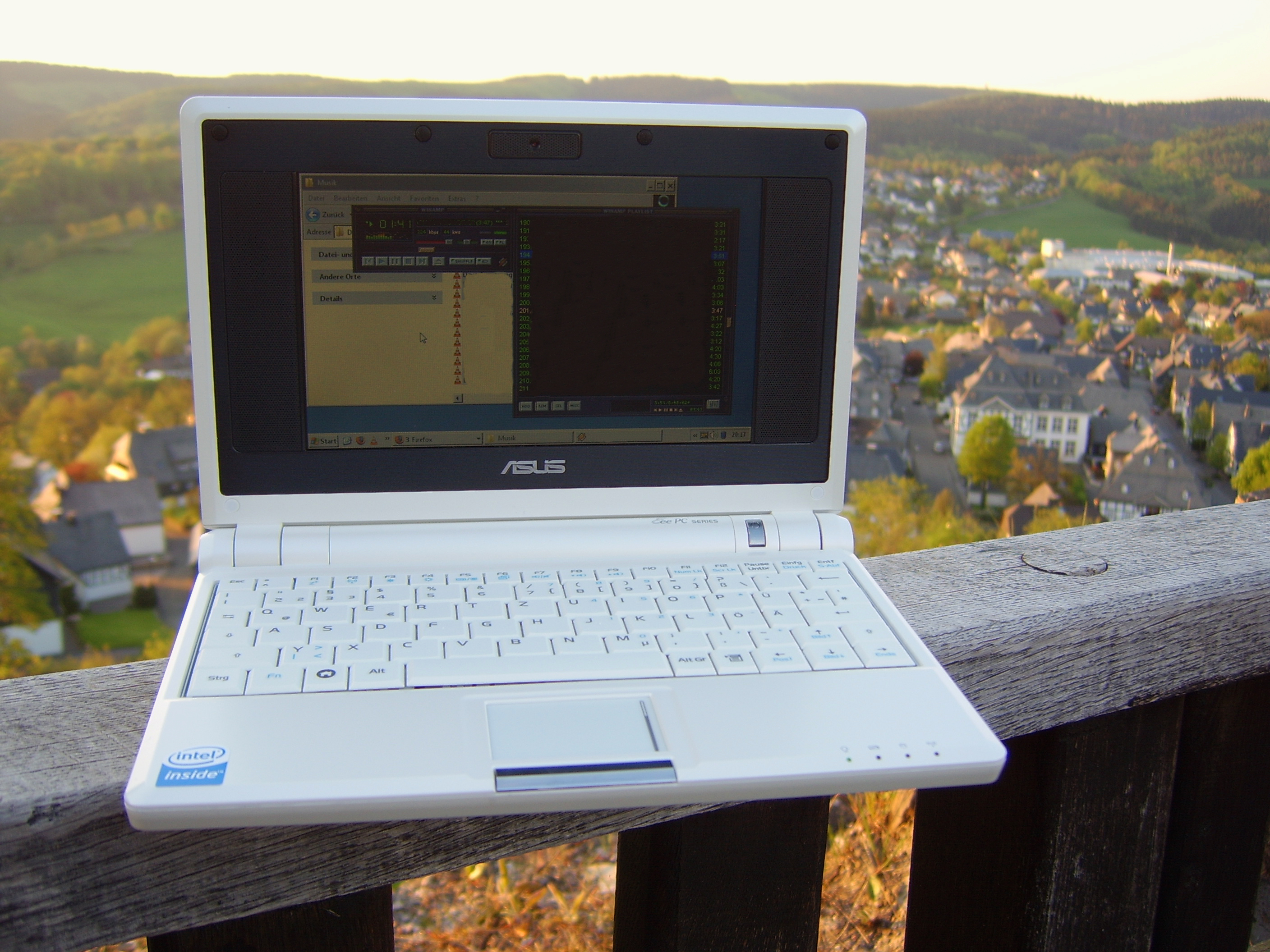 Der EEE-PC 4G (701) im Outdoor Einsatz, hier im Windows-Betrieb